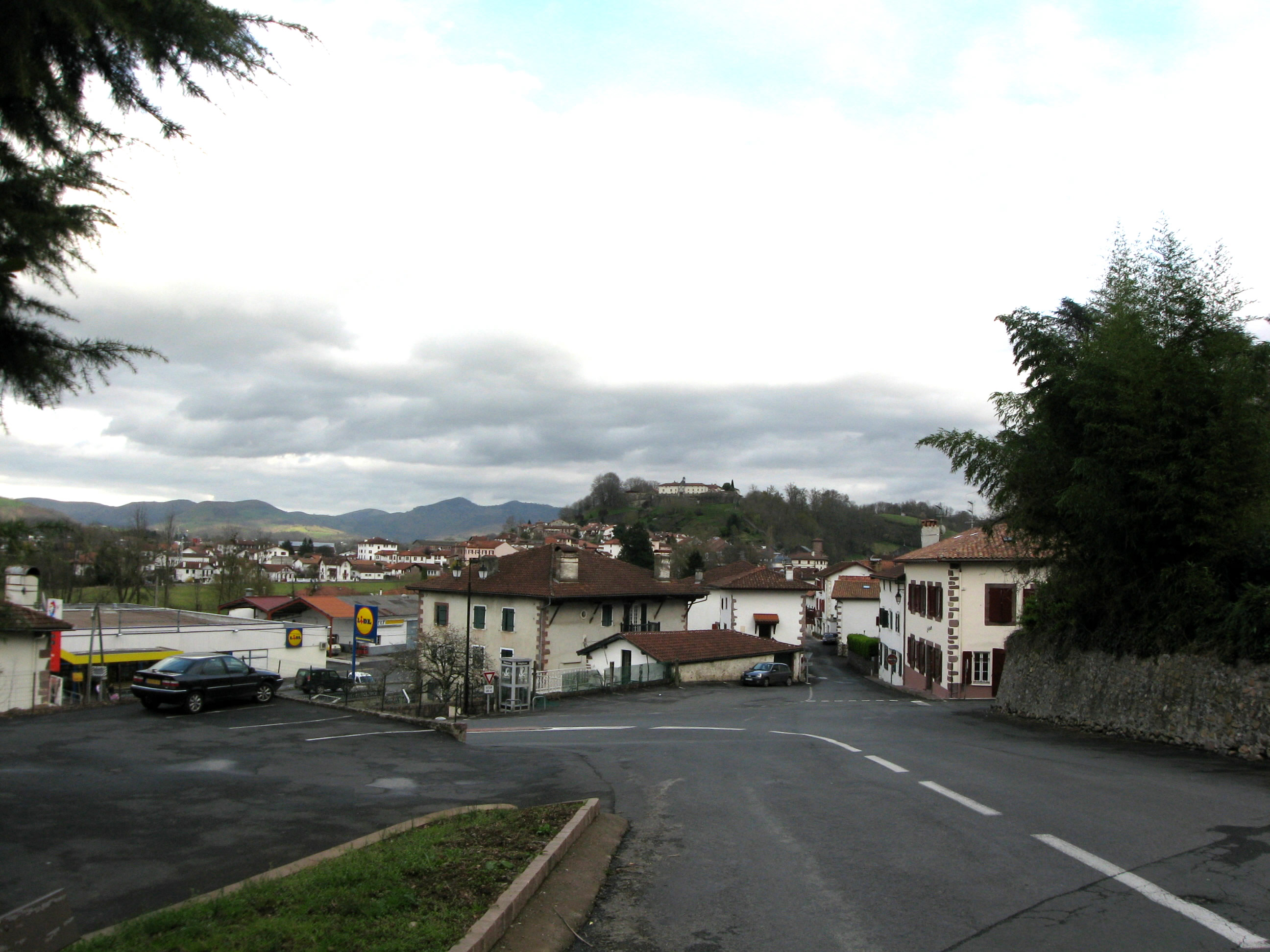 Entrée d'Uhart-Cize (Basse-Navarre) (Pyrénées-Atlantiques) (Pyrénées).